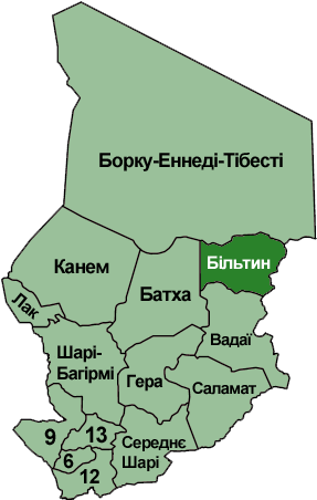 Бильтин серед префектур Чаду